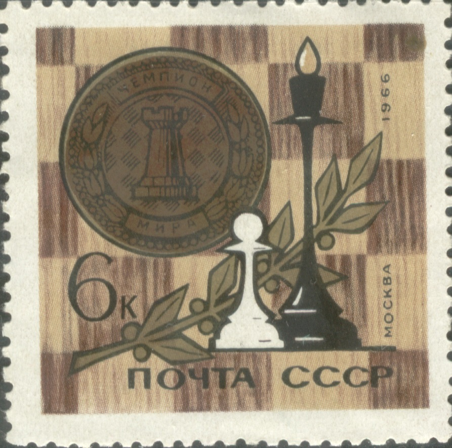 Briefmarke, Sowjetunion, 1966